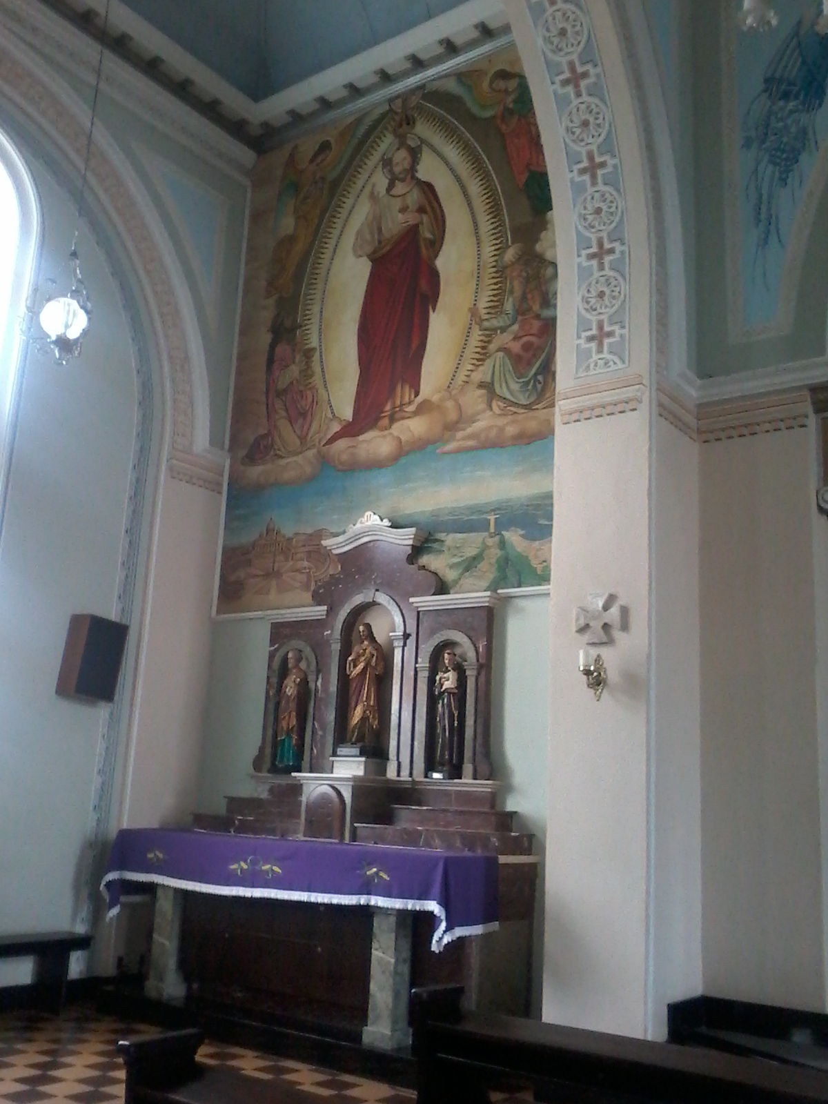 Painel esquerdo da Igreja Matriz de Piraí do Sul.